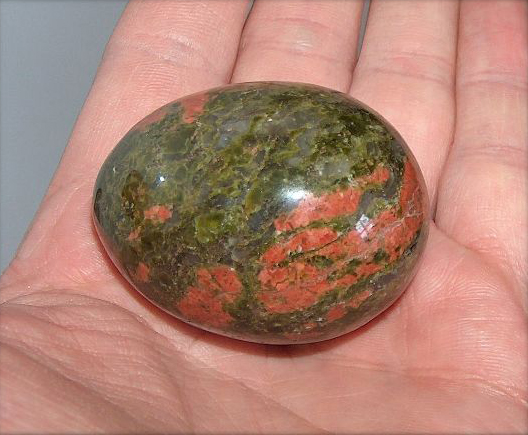 jaspis unakit, grudka polerowana,autor zdjęcia Grzegorz Framski